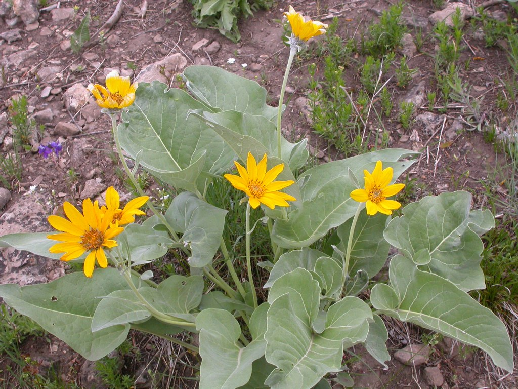 Balsamorhiza sagittata